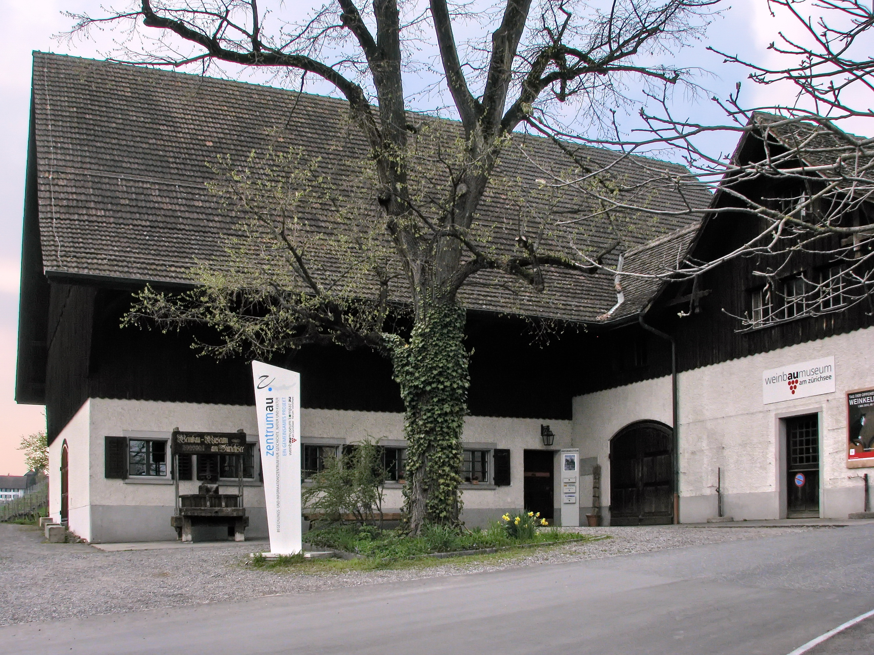 Halbinsel Au on Lake Zürich shore (Switzerland)